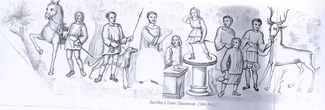 détail mosaique de lillebonne